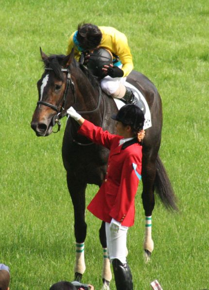 Vodka(horse)